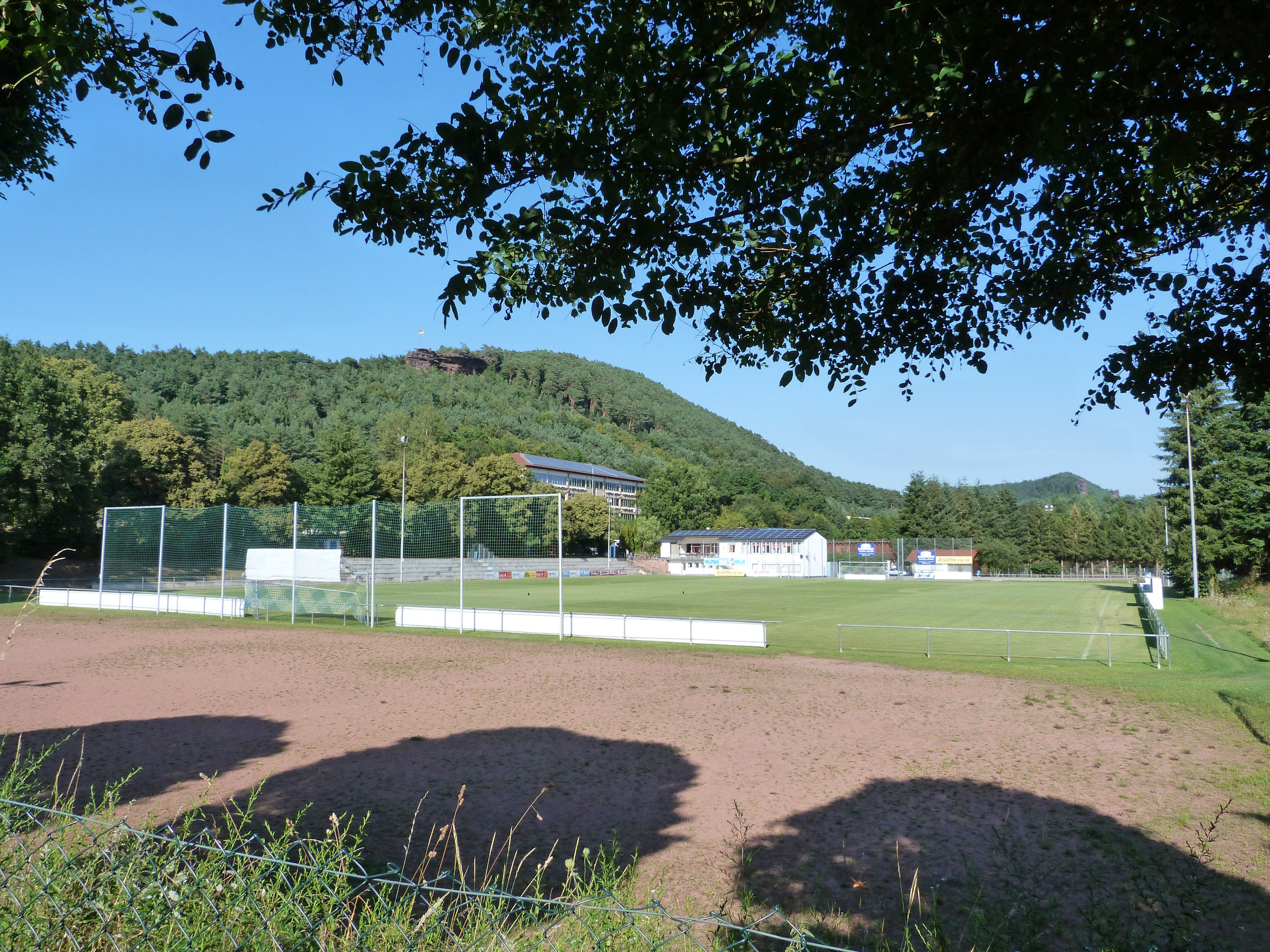 Sportplatz am Neding, Hauenstein, aufgenommen am 21.08.2013